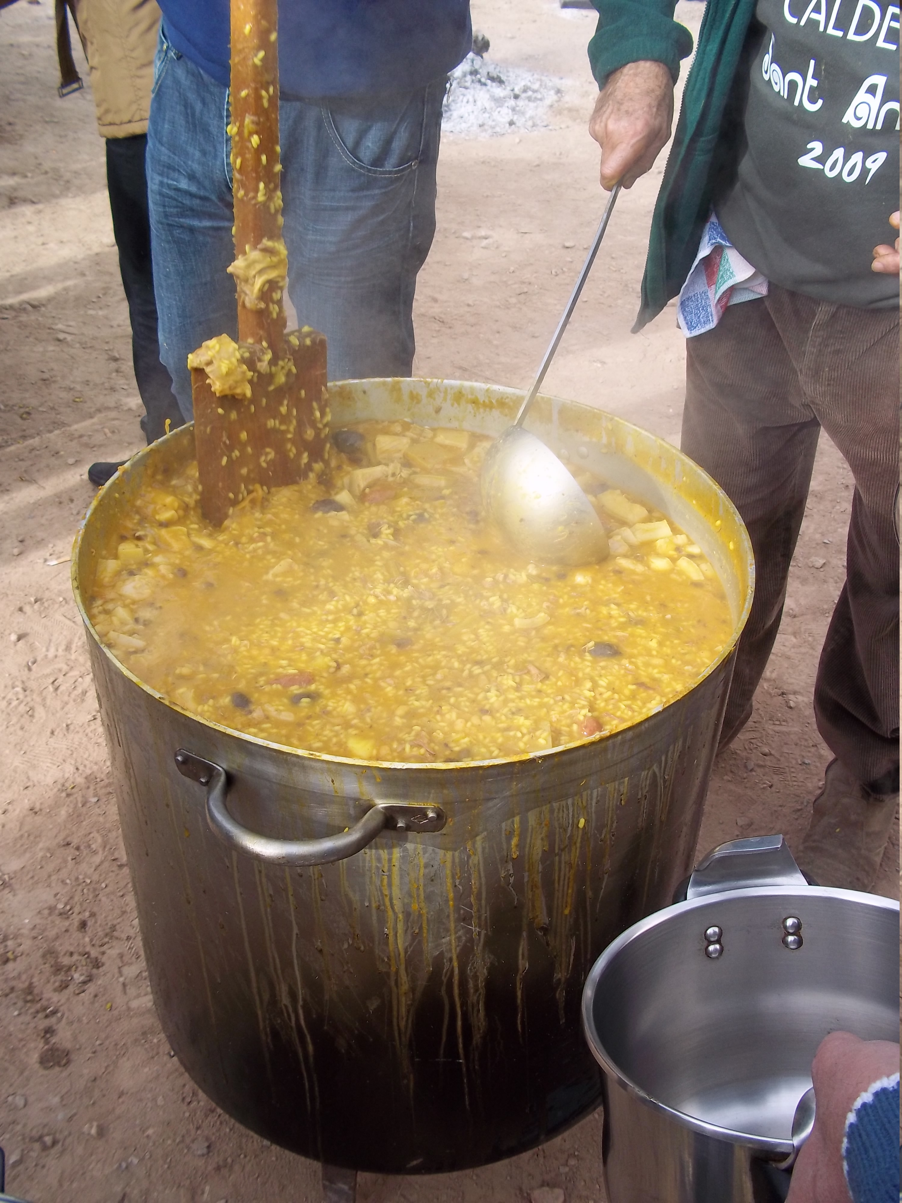 Cuinant Caldera a Massalfassar